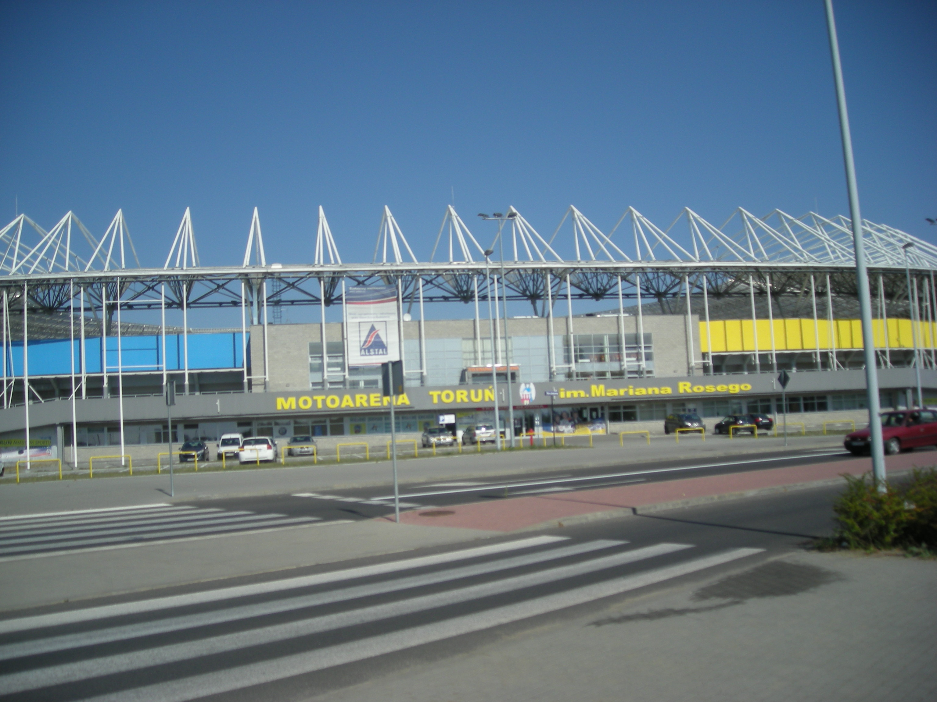 Motoarena Toruń im.Mariana Rosego